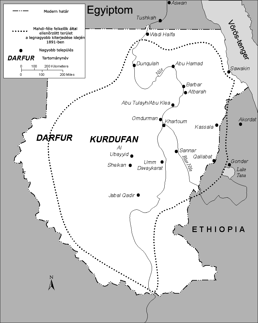 A Mahdi-felkelés térképe (Szudán)